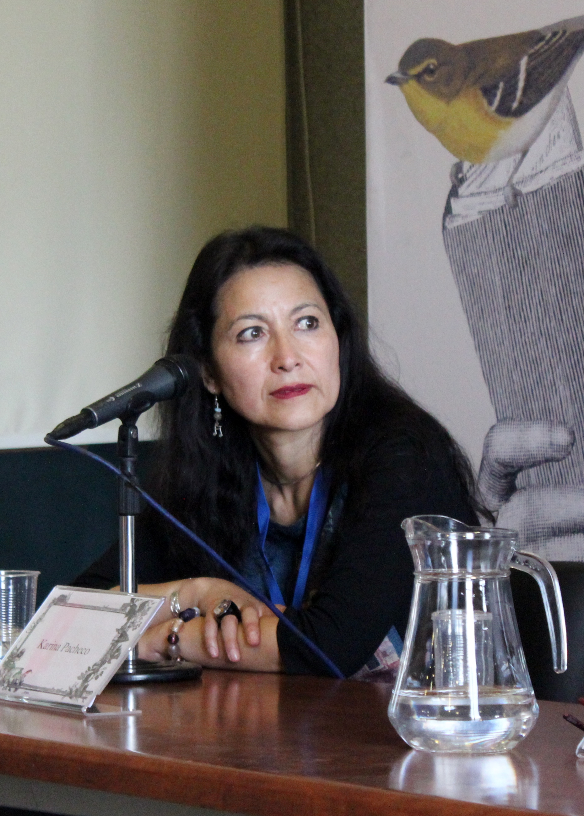 La escritora peruana Karina Pacheco durante la presentación del libro de su compatriota Francesca Denegri El abanico y la cigarrera. La primera generación de mujeres ilustradas en el Perú, realizada en la Feria Internacional del Libro de Santiago 2018 (sala Pedro Prado, 26 de octubre).